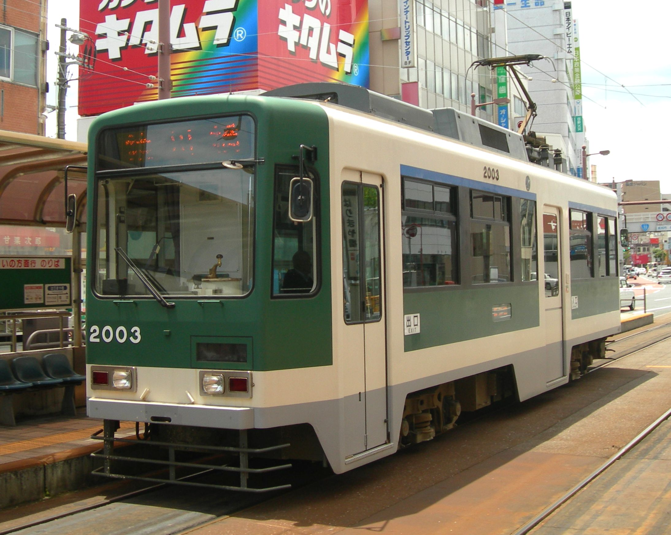 土佐電気鉄道2000形電車